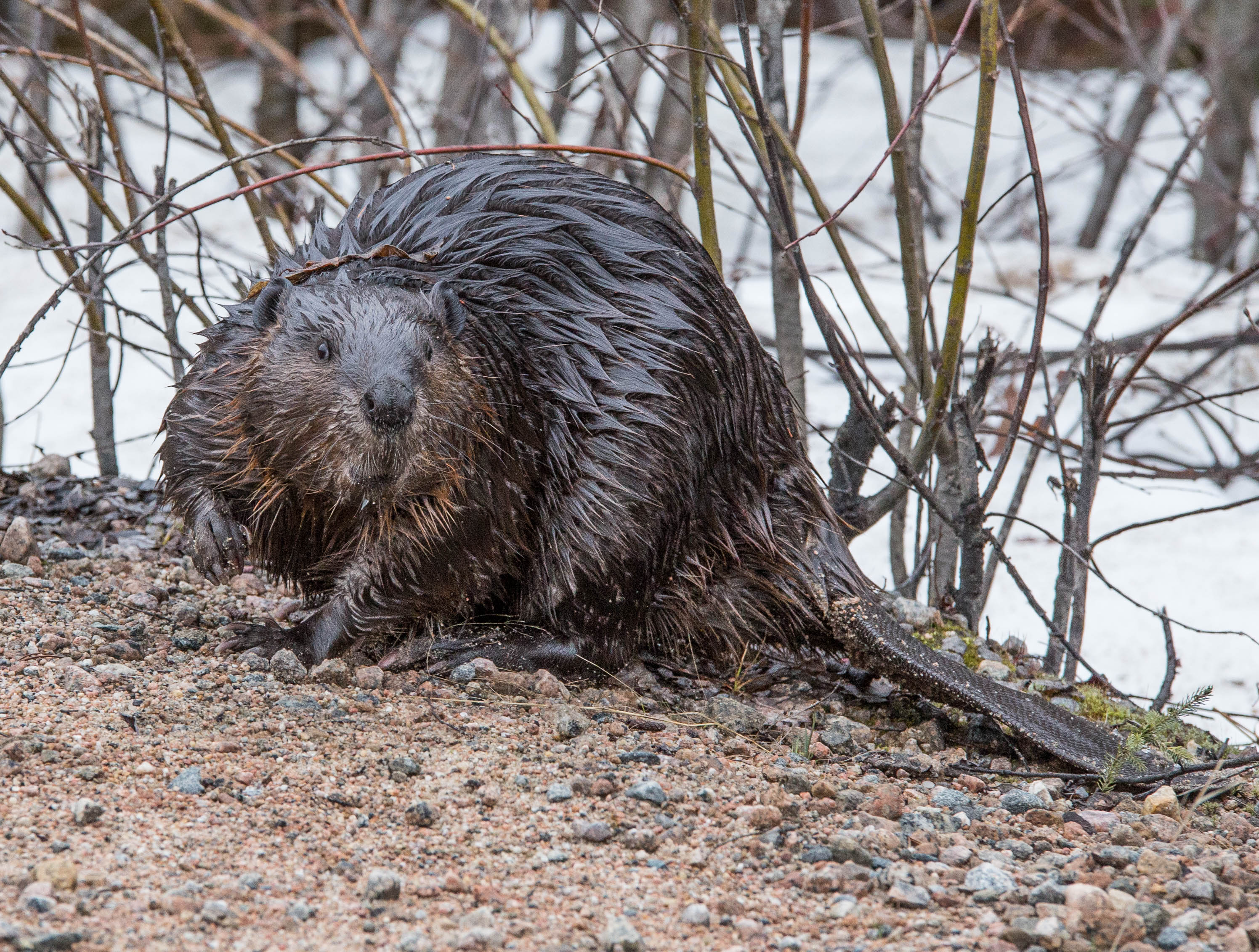 Photo personnelle: un castor aux aguets sur le chemin Rivière-aux-Rats, près de Manawan.Atikamekw : Amiskw